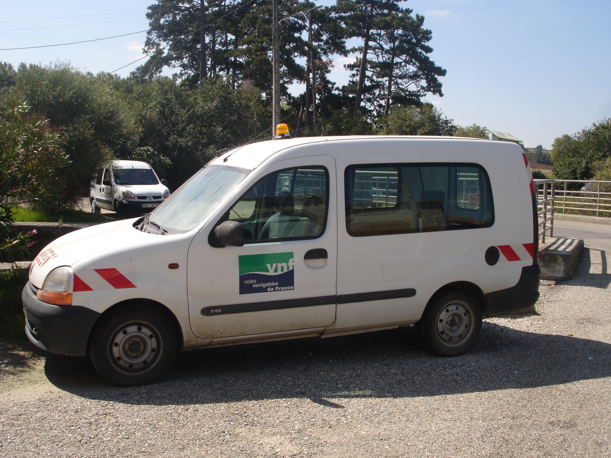 France, Haute-Garonne (31), Canal du Midi, port de Négra, voiture de service des voies navigables de France